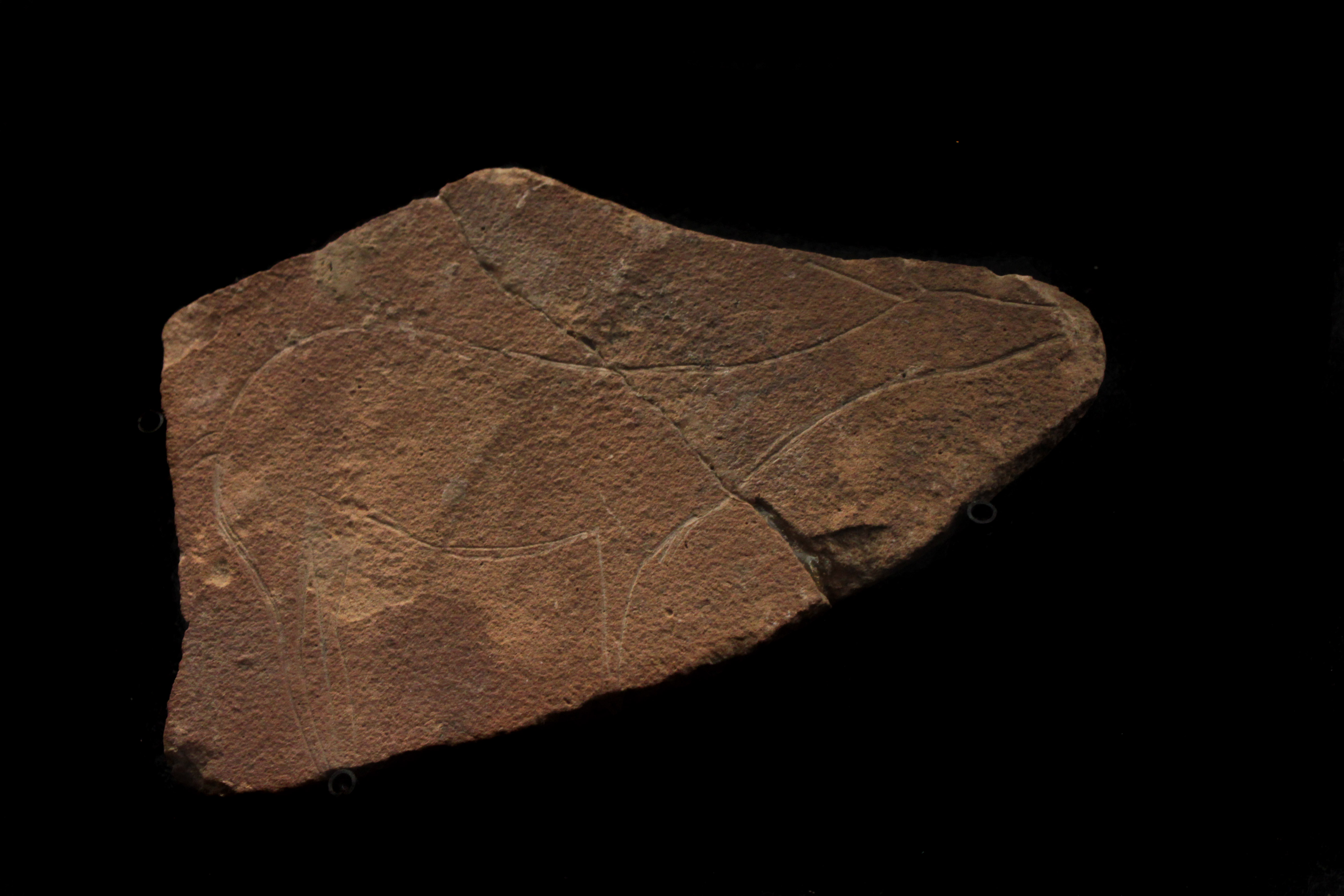 Grabado en roca datado en el Gravetense-Solutrense inferior de la Cova del Parpalló (Gandía). Fondos del Museo de Prehistoria de Valencia, Comunidad valenciana, España.